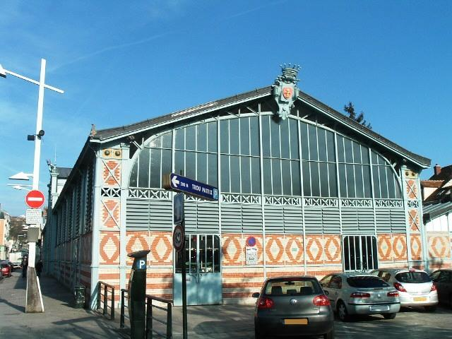 La halle du marché couvert de Corbeil-Essonnes (91)